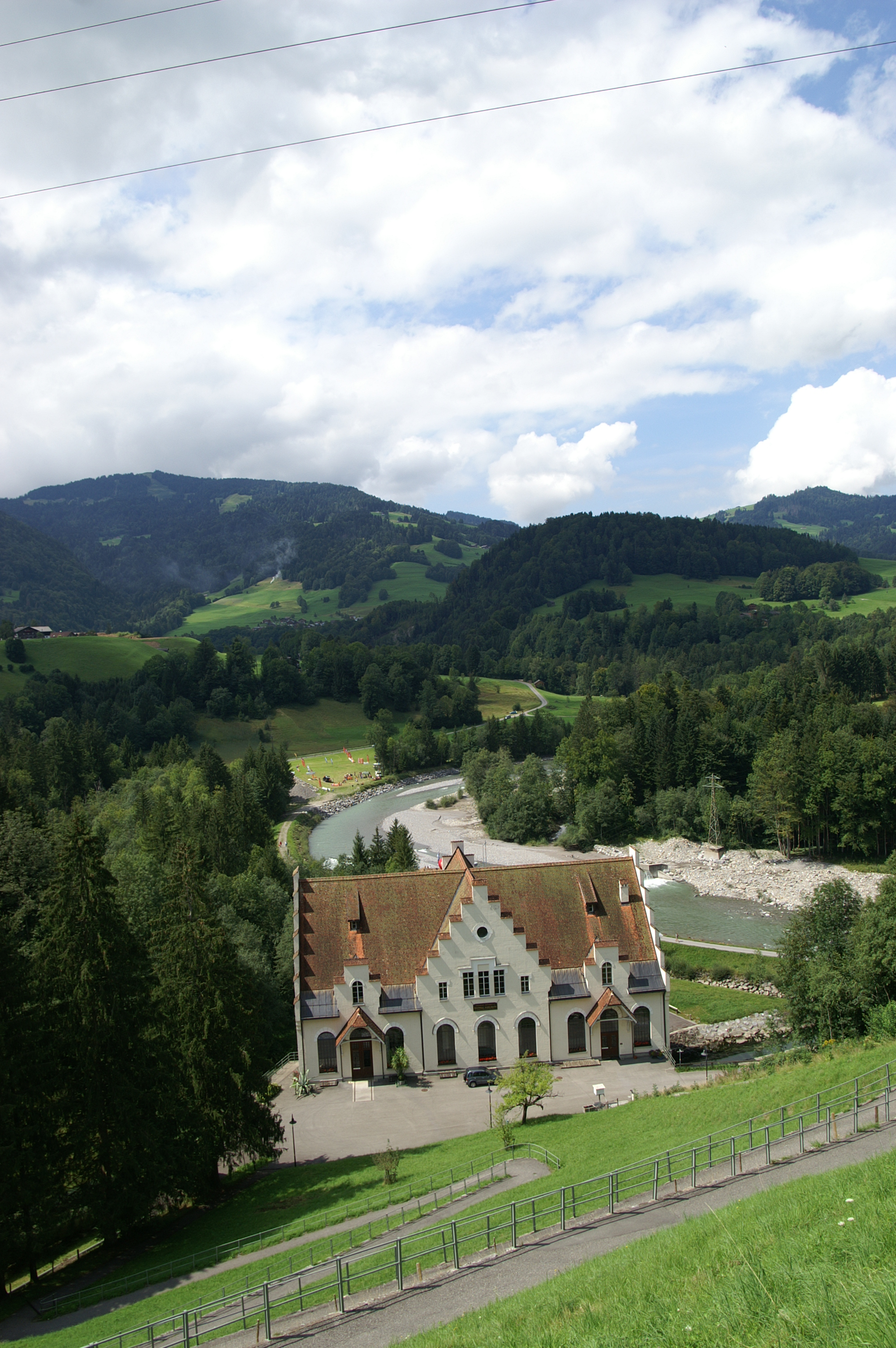 Kraftwerk der Vorarlberger Kraftwerke in Andelsbuch Jugendstil-Stufengiebelbau der Vorarlberger Kraftwerke von 1908. Mit der damaligen Leistung von 10.000 PS war es das größte Elektrizitätswerk Österreichs. Gesamtkomplex mit Stausee, Wehranlage, Druckrohrleitung, Umspannwerk, Unterwasserkanal und Krafthaus mit fünf Turbinen. 51 Mio kWh Jahreserzeugung. *** Veröffentlicht: Barbara Motter & Barbara Grabher-Schneider in "Orte-Fabriken-Geschichten ISBN 978-37099-7097-3 2014